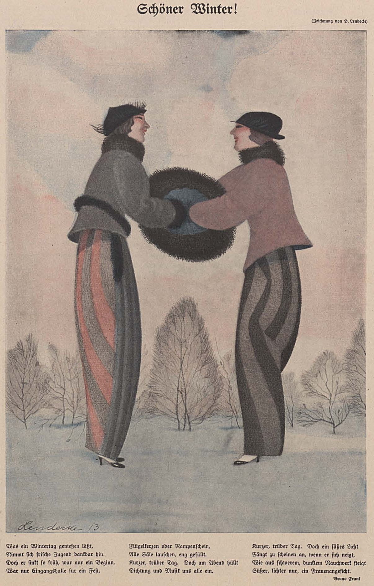 Illustration im Simplicissimus von Otto Friedrich Carl Lendecke (1886–1918) zu dem Gedicht „Schöner Winter!“ von Bruno Frank, 1914.